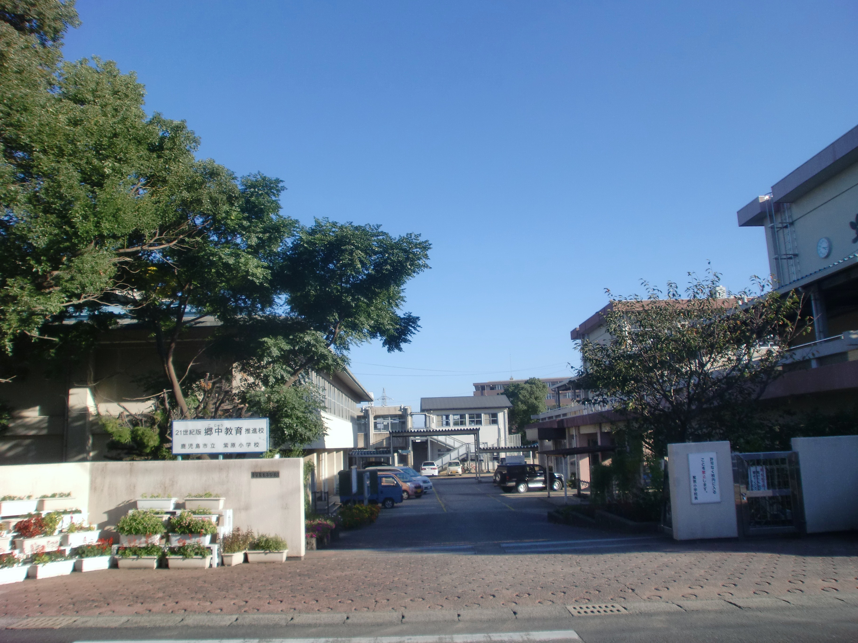 鹿児島市立紫原小学校の外観